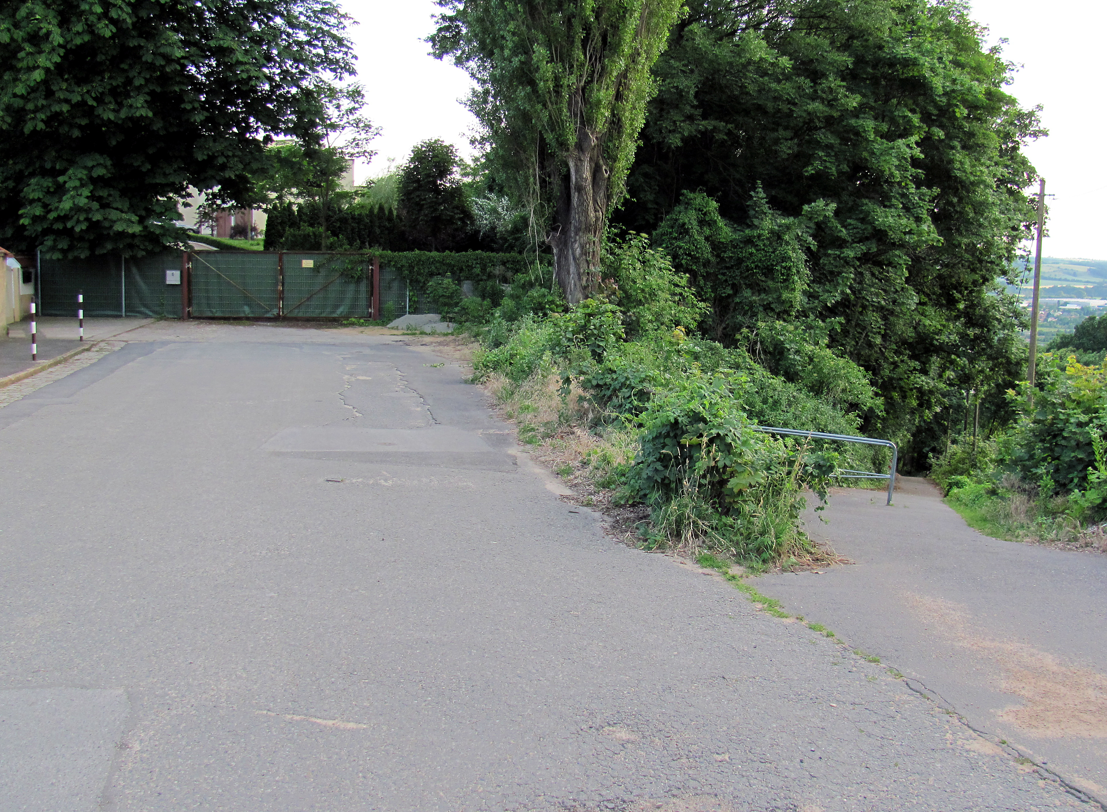 Radebeul, Obere Burgstraße vor der Friedensburg, rechts geht die Straße weiter den Berg hinunter